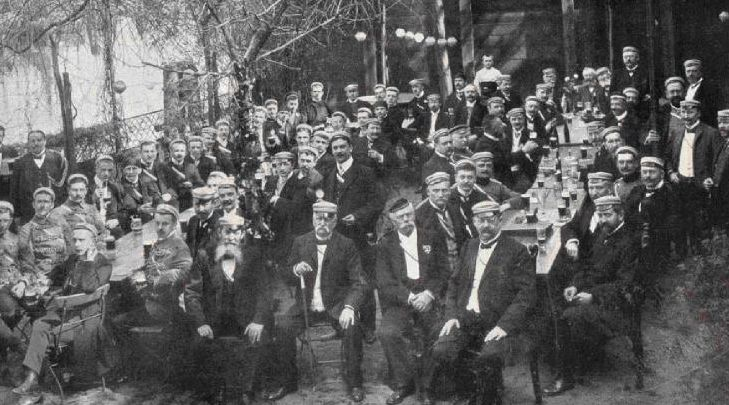 Fotografie von Angehörigen des Corps Masovia beim 80. Geburtstag von Wilhelm Schimmelpfennig, Königsberg 1907